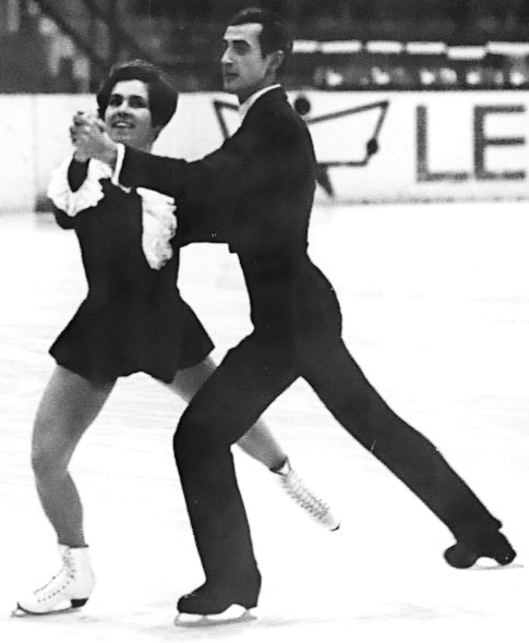 Lyudmila Pakhomova and Aleksandr Gorshkov in 1969.